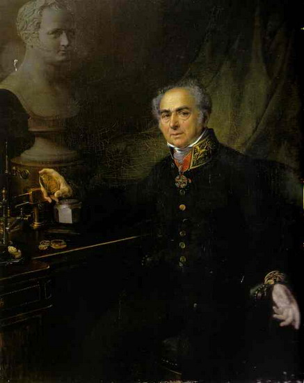 Леберехт Карл Александрович (1824)